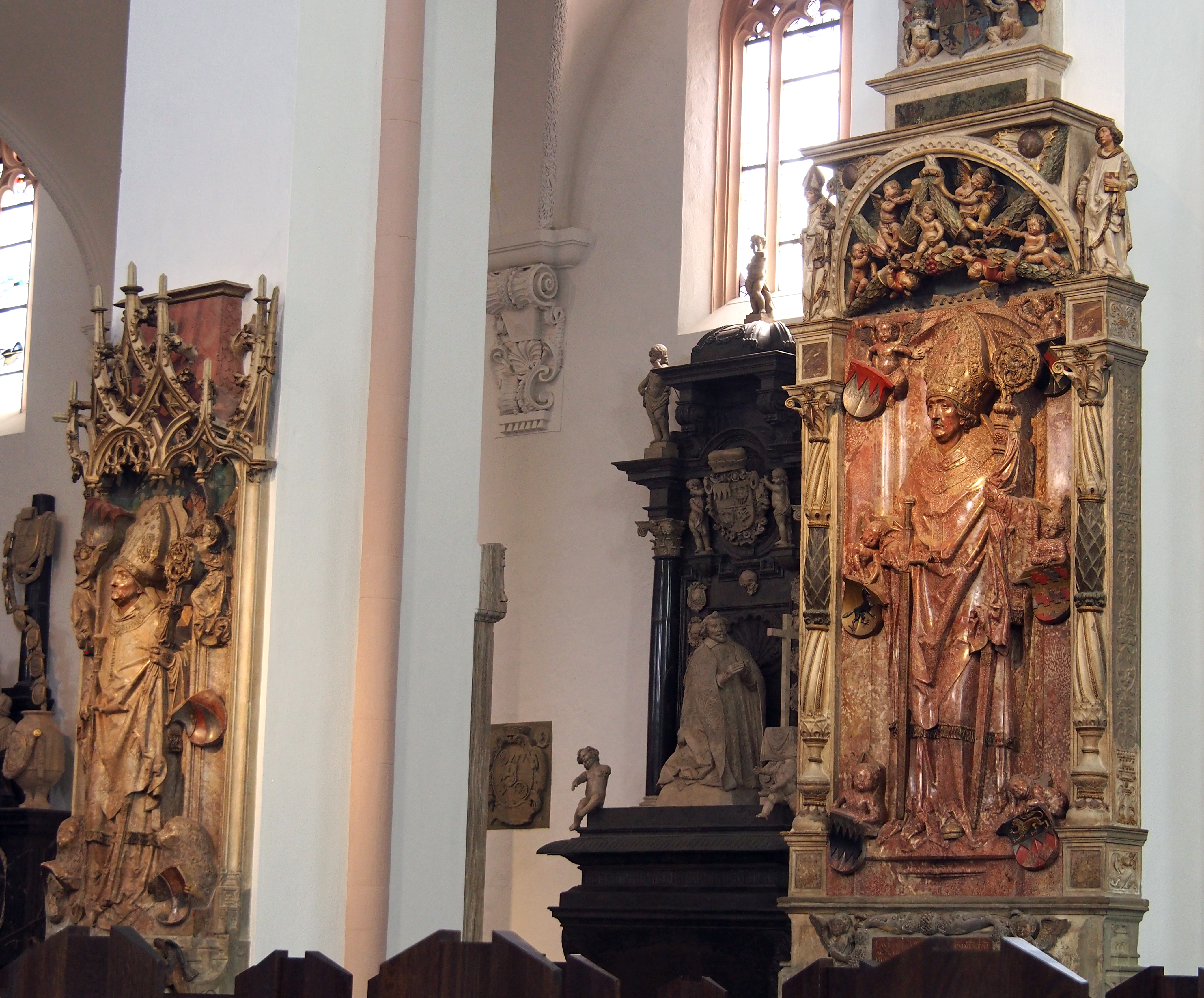 Grabdenkmale im Würzburger Dom. Links Epitaph des Fürstbischofs Rudolf von Scherenberg, rechts das Epitaph des Fürstbischofs Lorenz von Bibra.